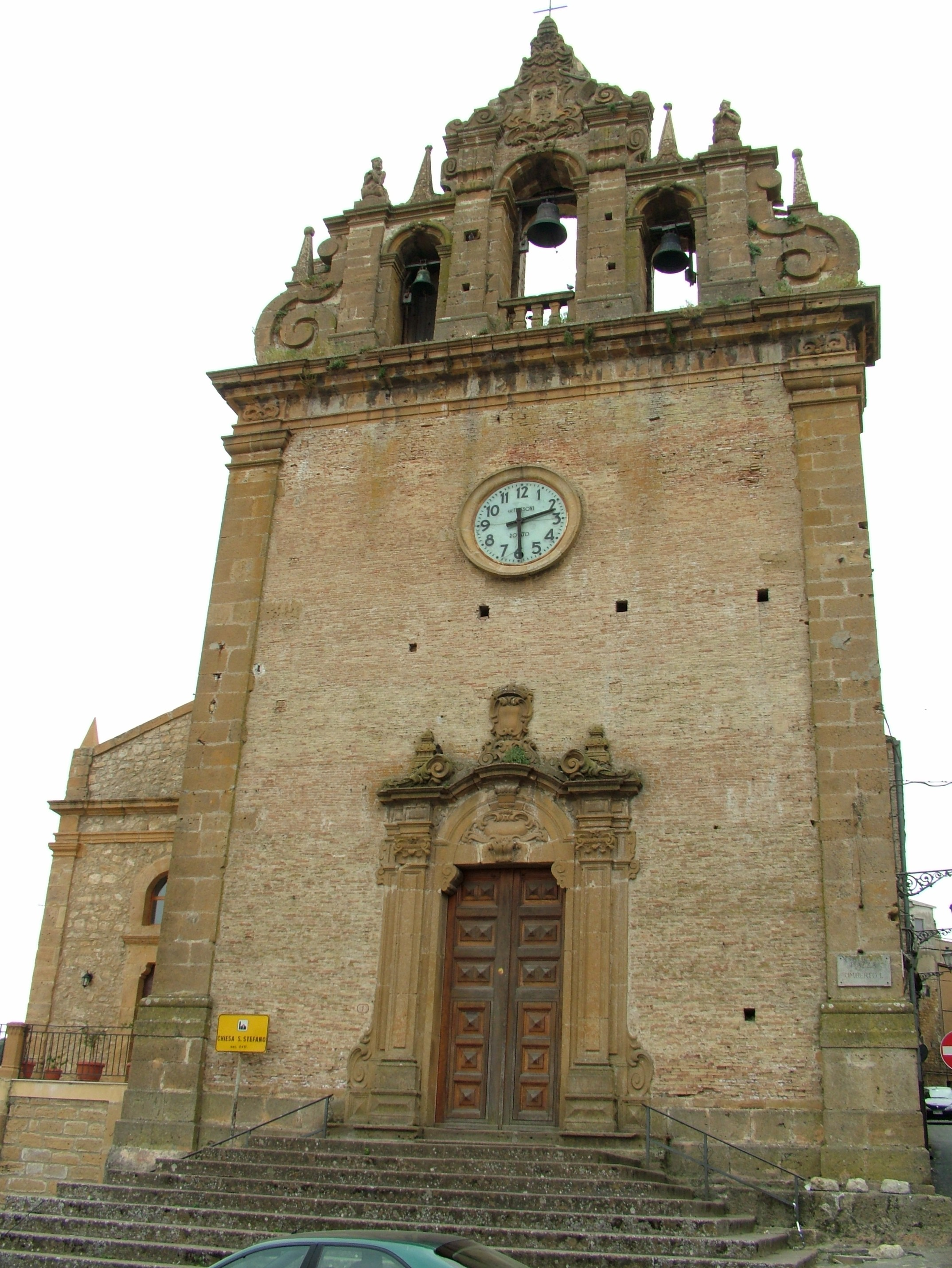 Piazza Armerina, Chiesa S. Stefano, Sizilien, Italien, am Weg zur Villa Romana del Casale